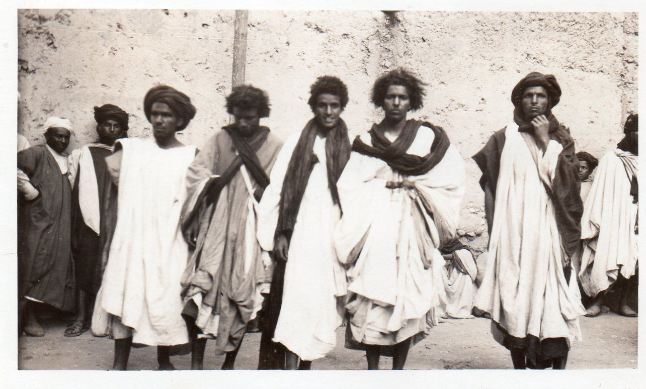 Hommes bleus à Goulimine vers 1935.